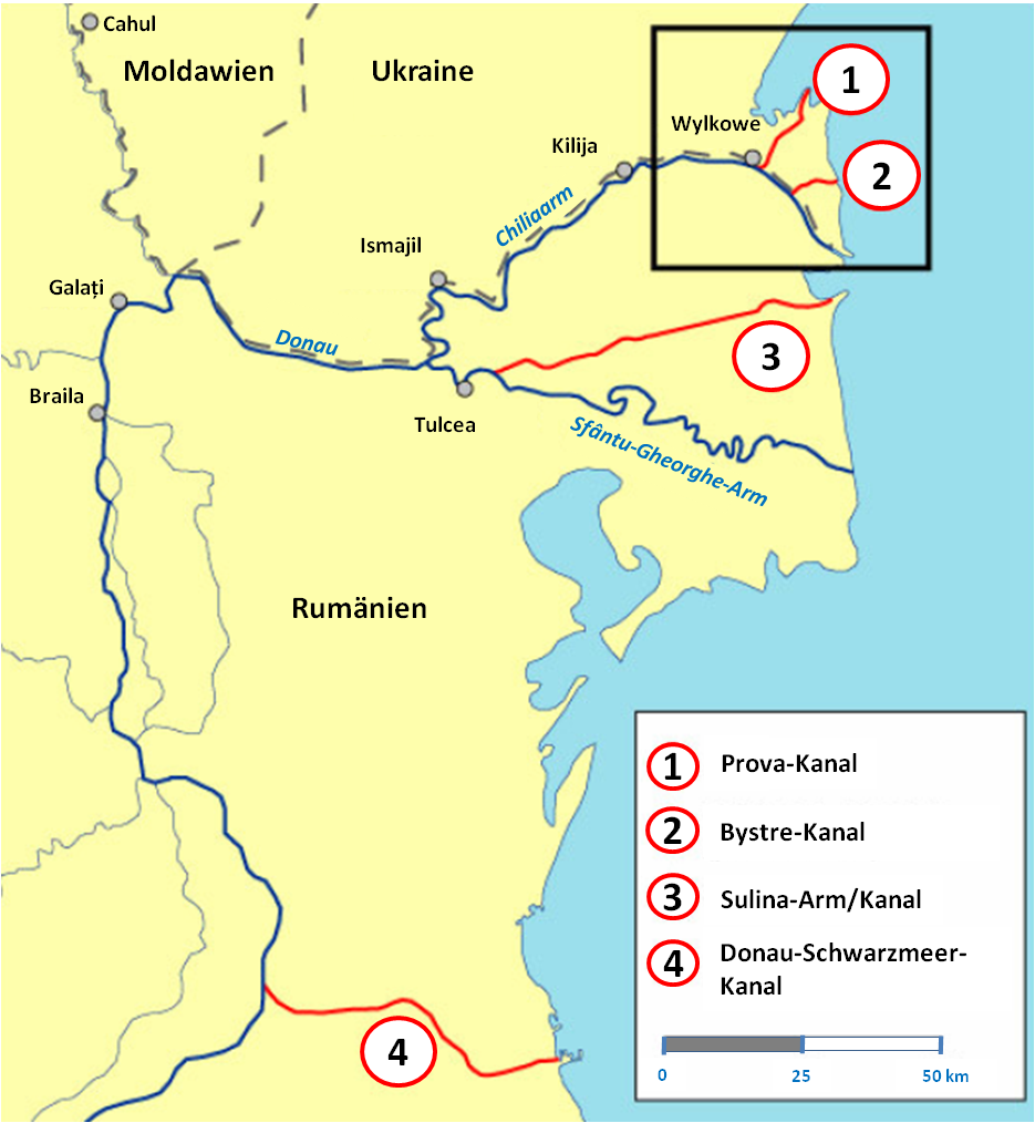 Kanäle im Donaudelta